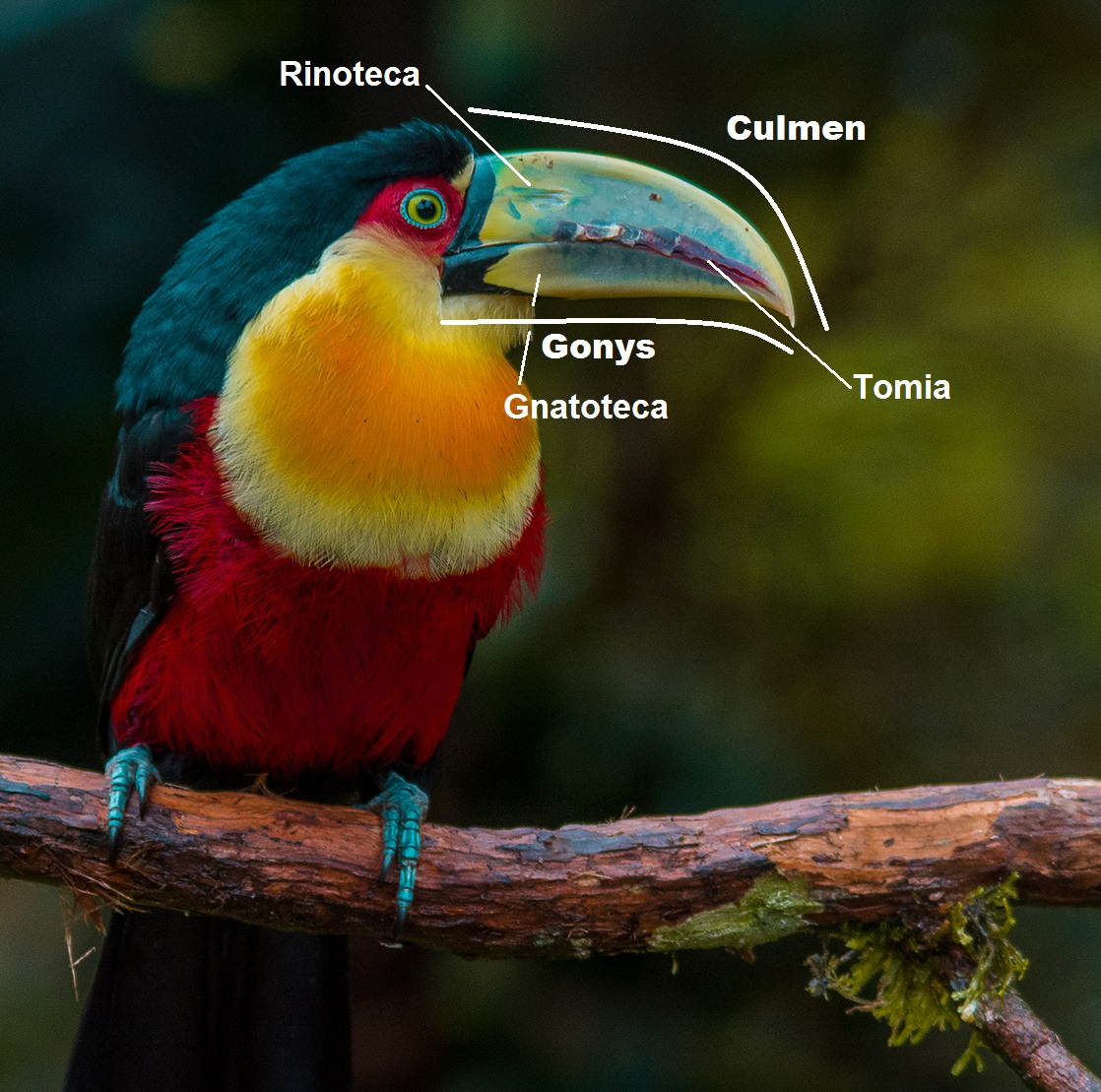 Estruturas externas do bico esquematizadas no tucano-de-bico-verde (Ramphastos dicolorus). Pode-se observar a extensão correspondente ao culmen e ao gonys na rinoteca e gnatoteca, respectivamente, e a tomia (bordas cortantes presente nas laterais da rinoteca e gnatoteca).